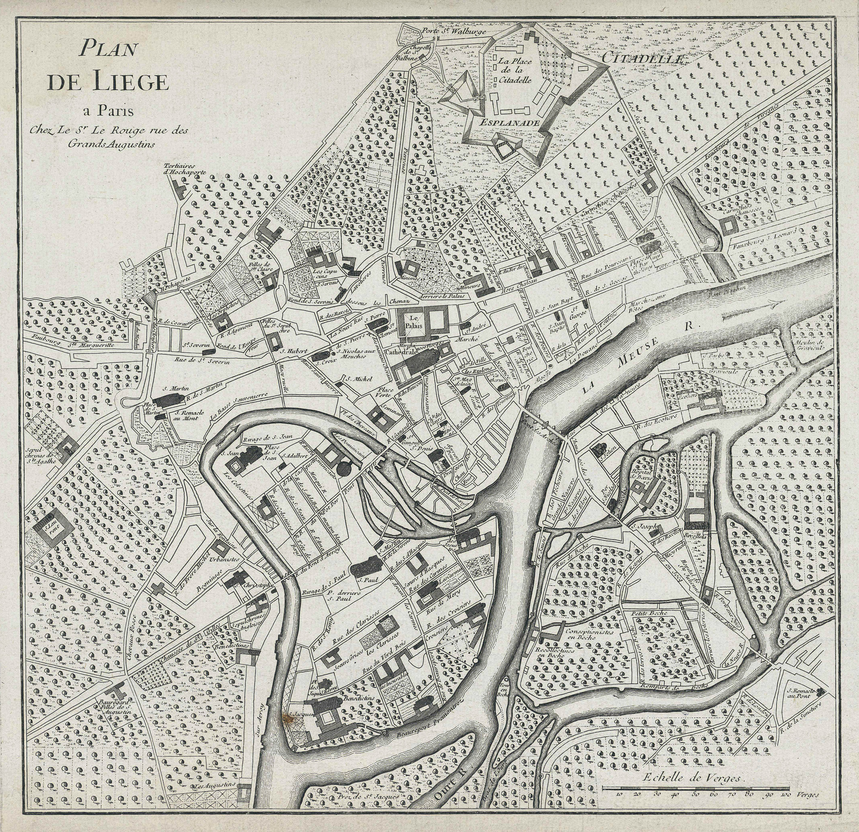 Plan de Liège par Georges-Louis Le Rouge.